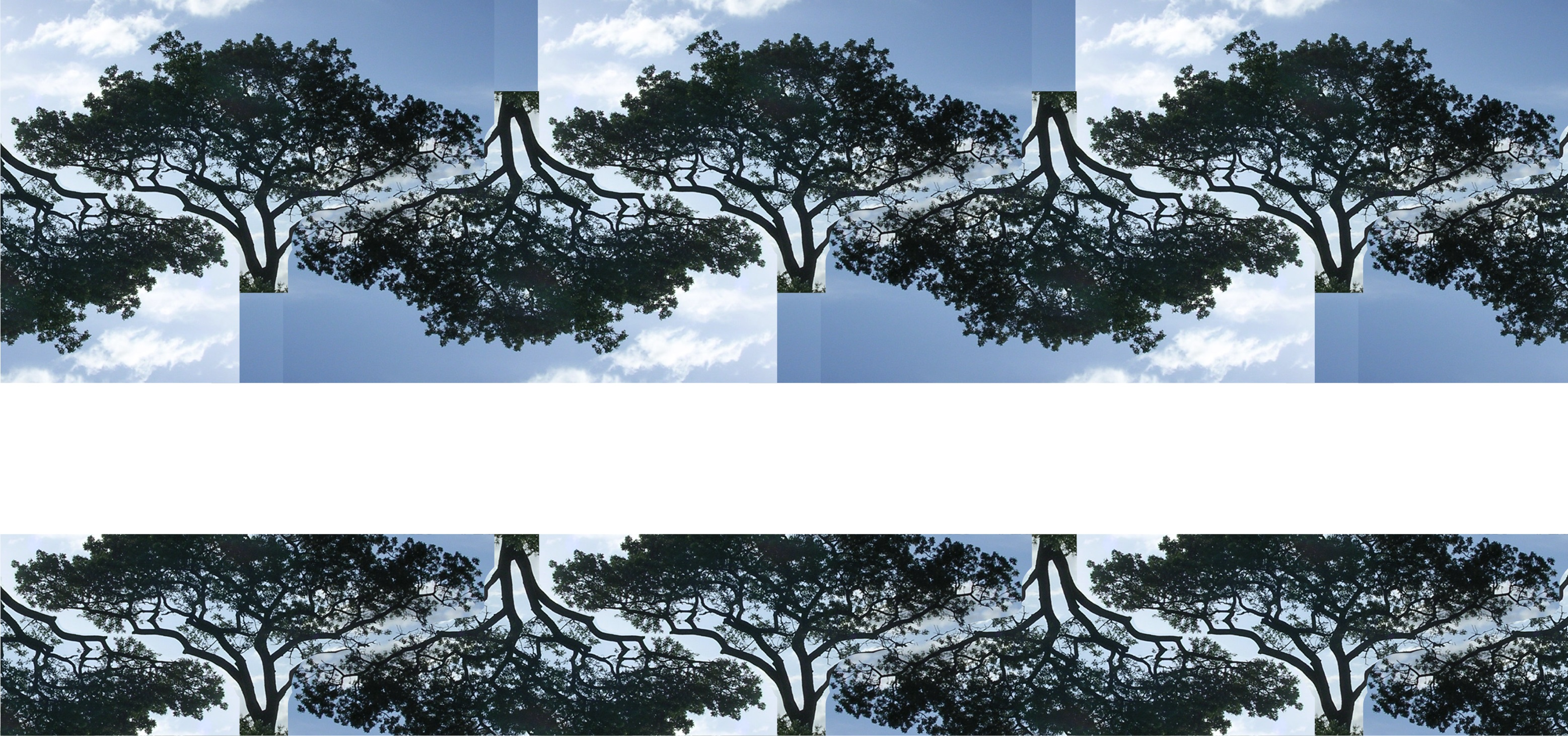 Șir de arbori - ilustrare teoria constructală